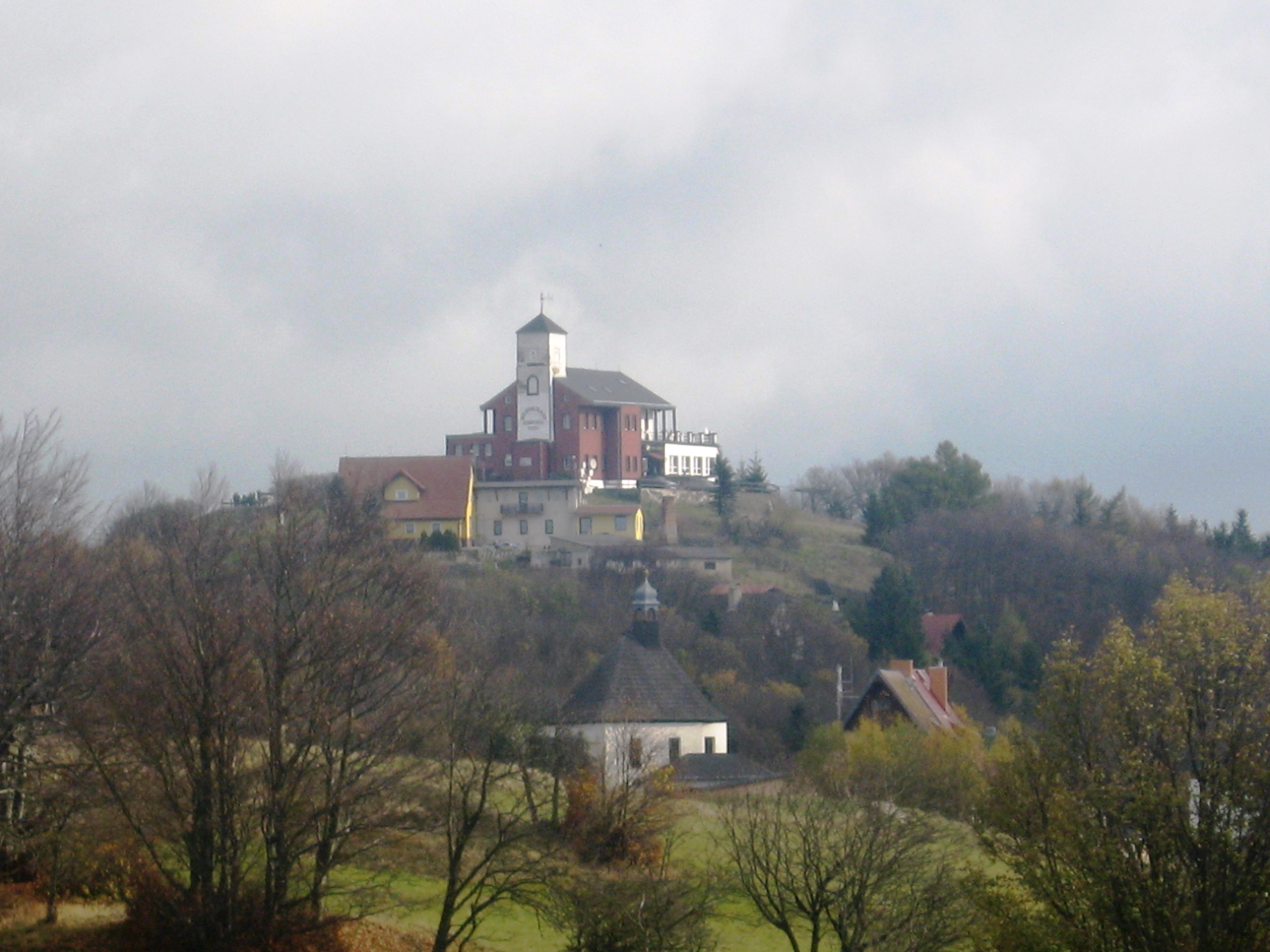 Komáří hůrka a Komáří vížka